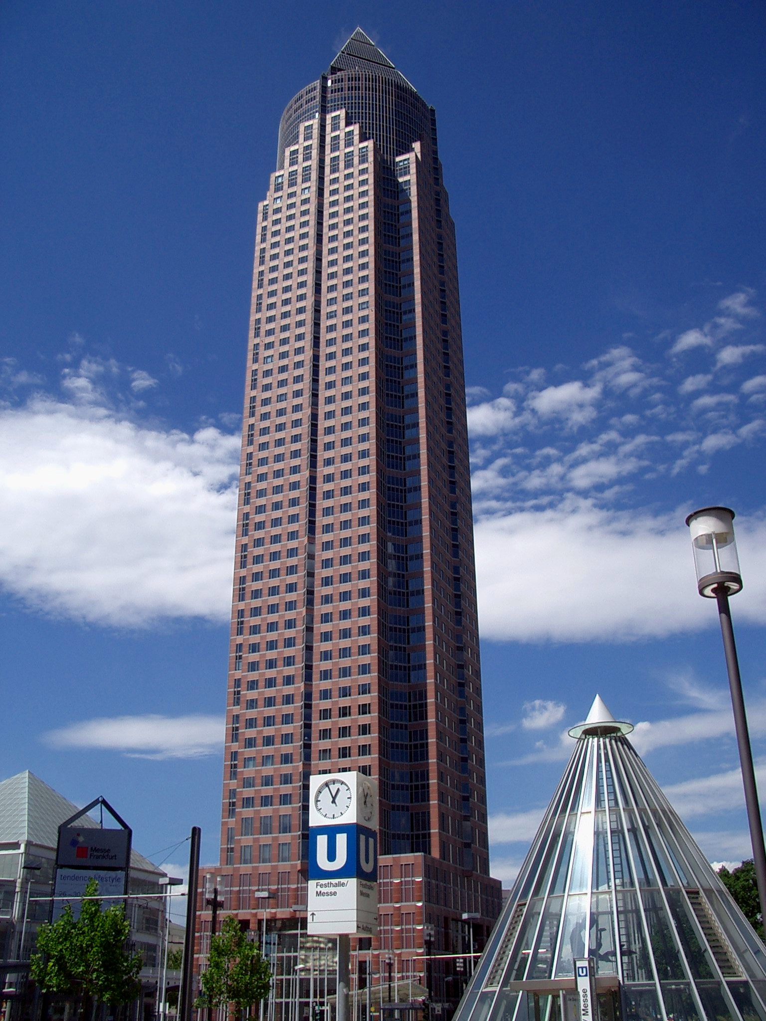 Fotograf: Christian Schwaeger Datum: 27.07.2005